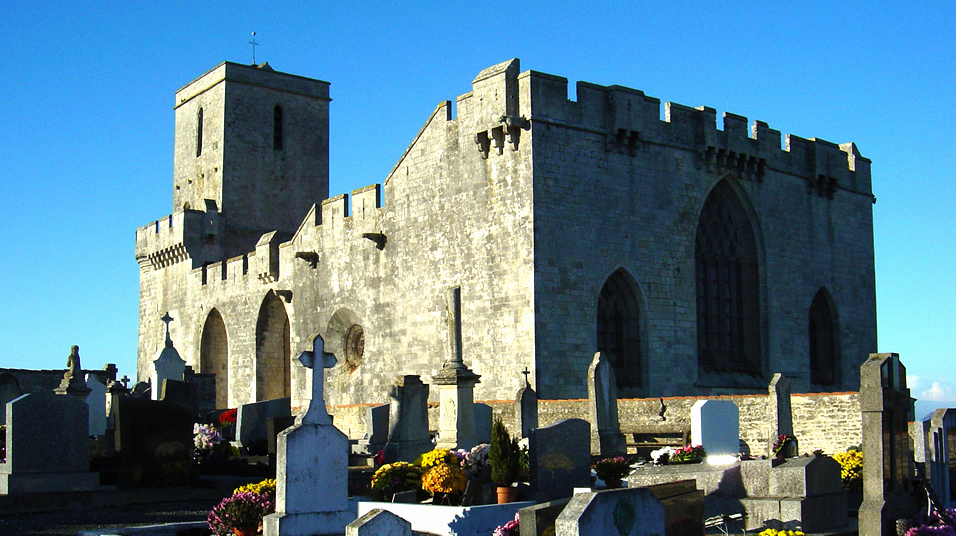 L'église d'Esnandes vue depuis le cimetière